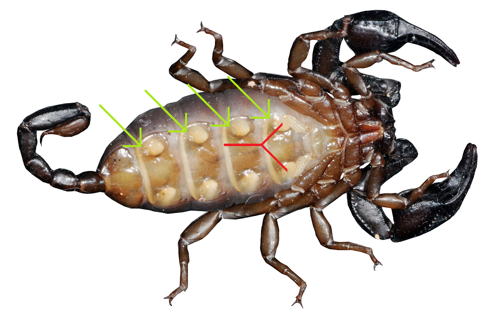 Euscorpius italicus, Weibchen, Gefangenschaft, ursprünglich aus dem Wallis, Schweiz